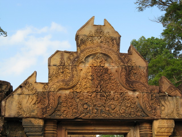 吴哥女王宫大门的山形墙